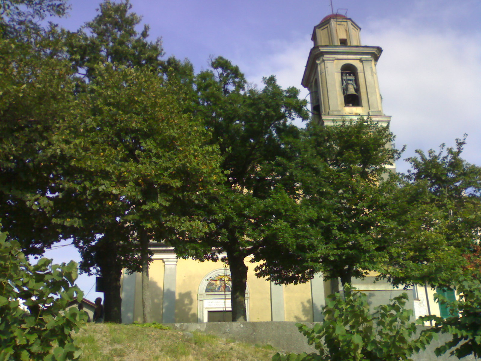 Santuario di Nostra Signora della Salute e della Pace di Fraconalto tra la val Lemme e la valle Scrivia.